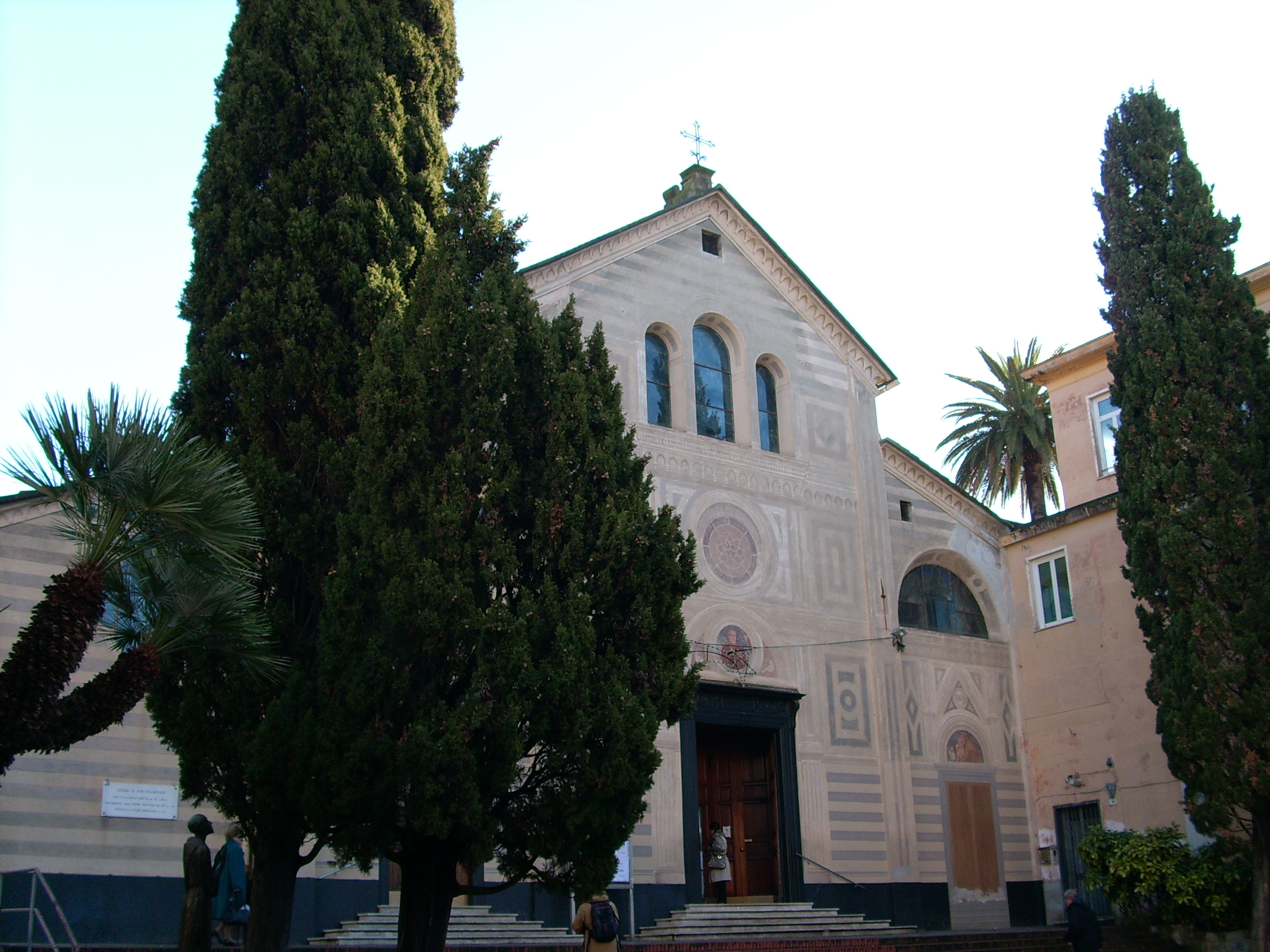 Chiesa di San Francesco, Rapallo, Liguria, Italy